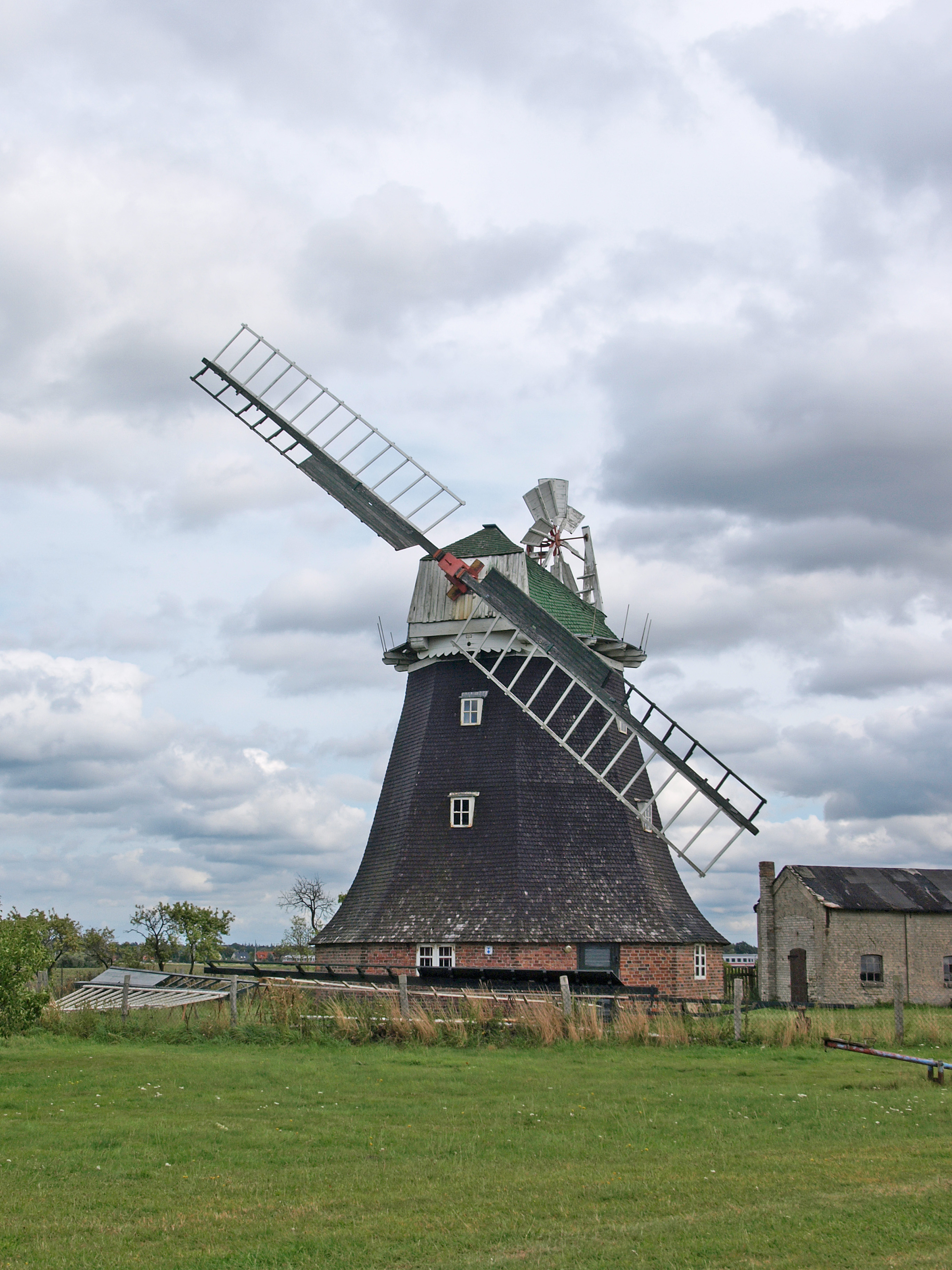 Windmühle in Rövershagen